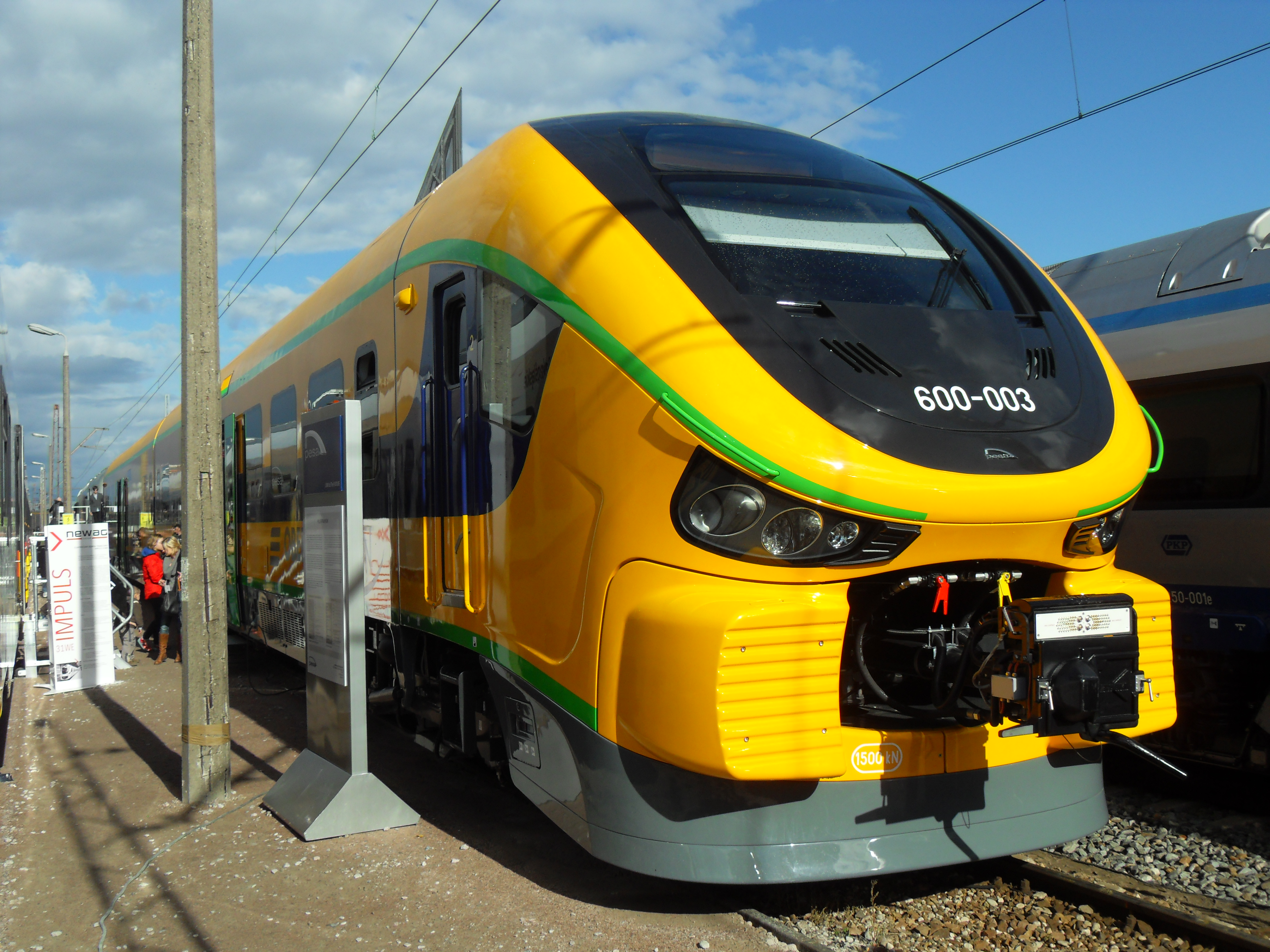 TRAKO 2013 w Gdańsku: PESA 600-003.